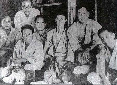 陳炘(右四, 在228事件中失蹤) Chen Shin (4th from right, disappeared in 228 Incident)羅萬俥(右一)、杜聰明(右三)、陳逢源(右六). Bân-lâm-gú: Tân-him(iū sì, tsāi 228 sū-kiānn tiong sit-tsong), Lô Bān-ki(iū tsi̍t), Tōo Tshong-bîng(iū sann), Tân Hông-guân(iū la̍k). 陳炘(右四, 在228事件中失蹤) 羅萬俥(右一)、杜聰明(右三)、陳逢源(右六)。